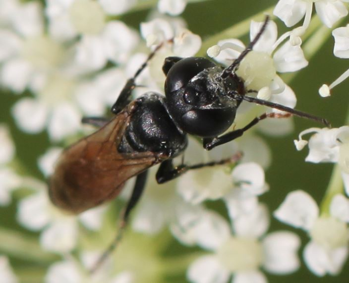 Tachysphex cf. pompiliformis am 8.7.2017 in der Schwetzinger Hardt